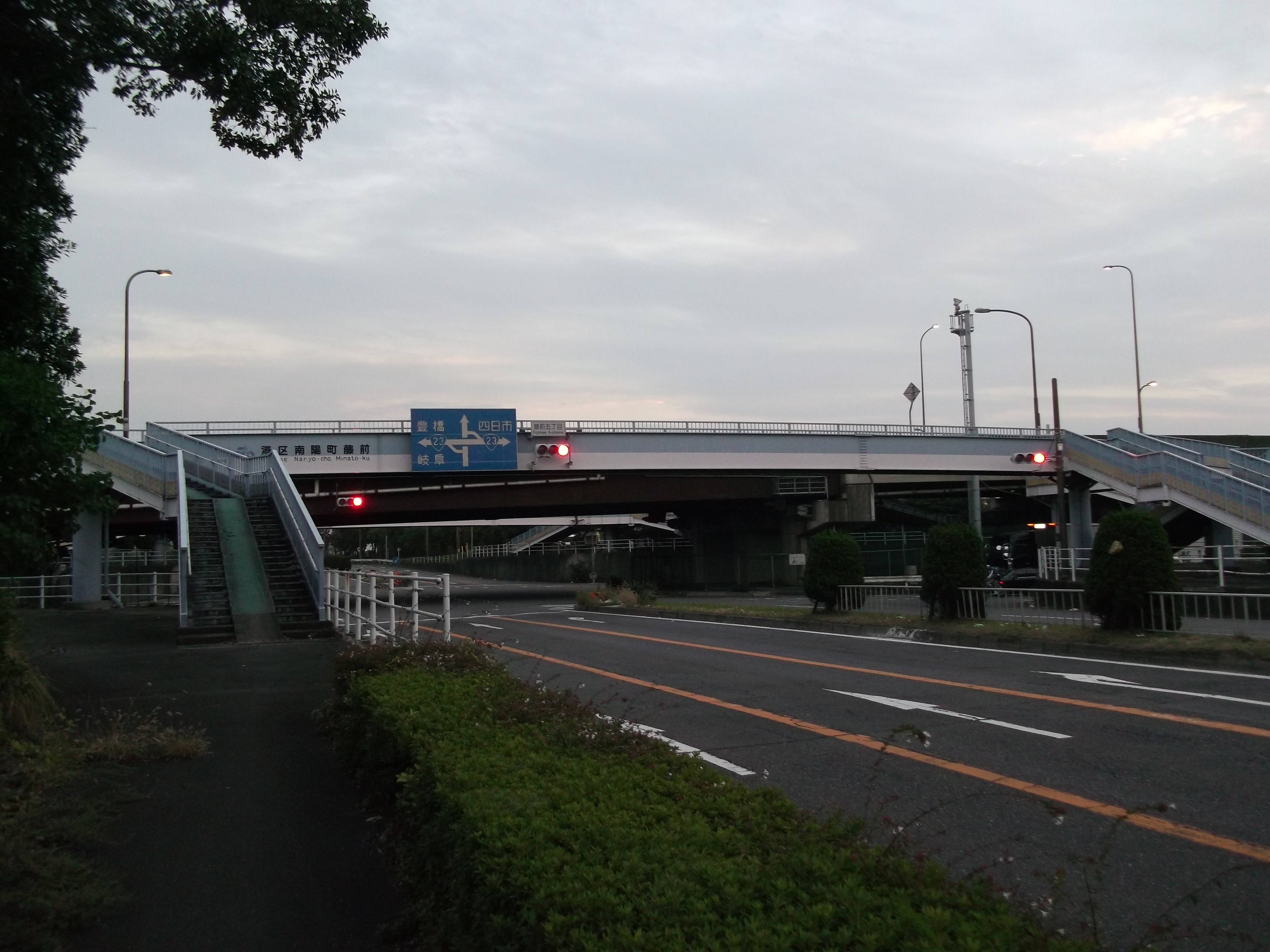 名古屋市港区の国道23号藤前流通団地インターチェンジを北側より撮影